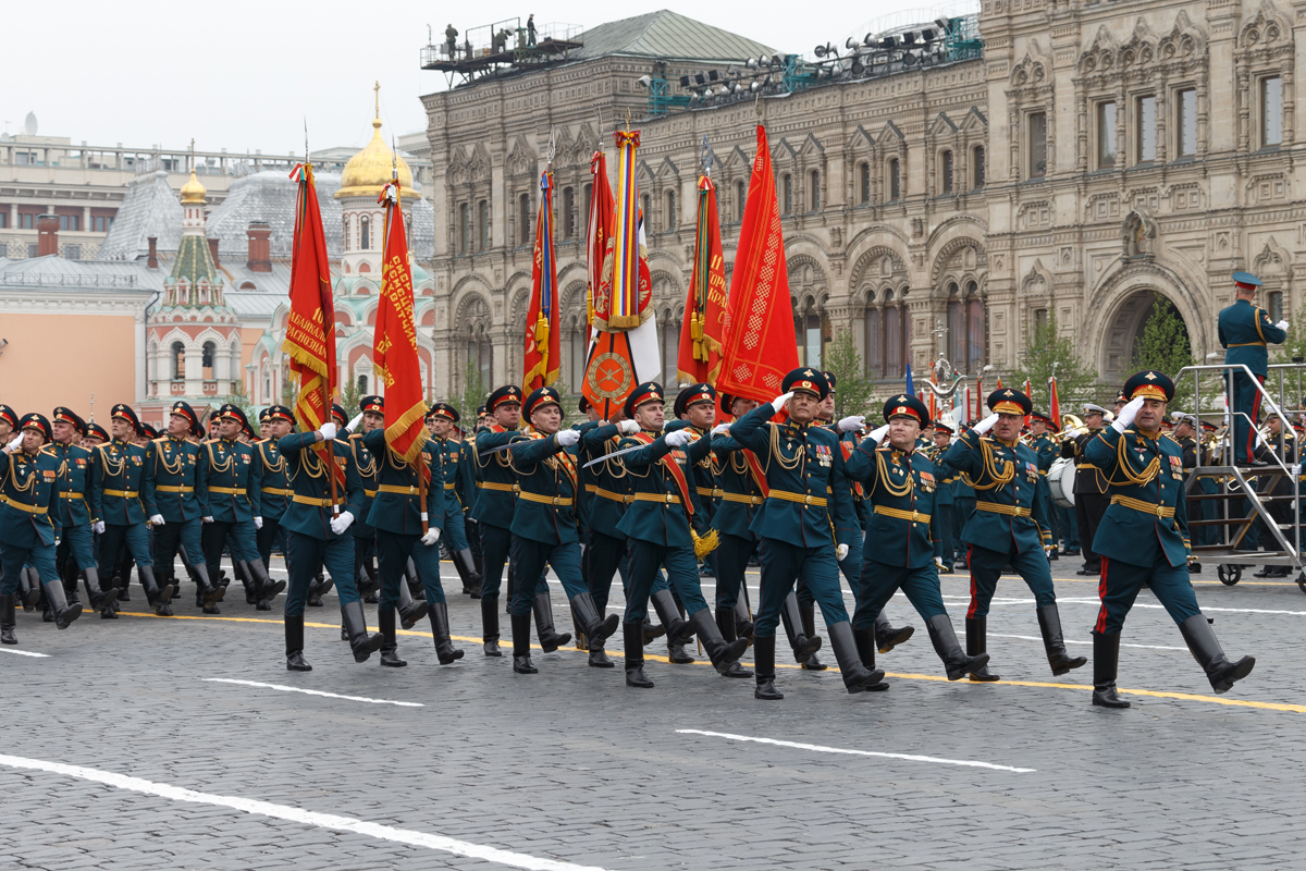 В Москве прошел парад в честь 74-й годовщины Победы в Великой Отечественной войне